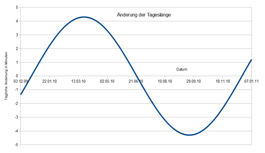 Tägliche Änderung der Tageslänge in Minuten in Frankfurt/Main im Jahresverlauf. Change of the length of day in minutes